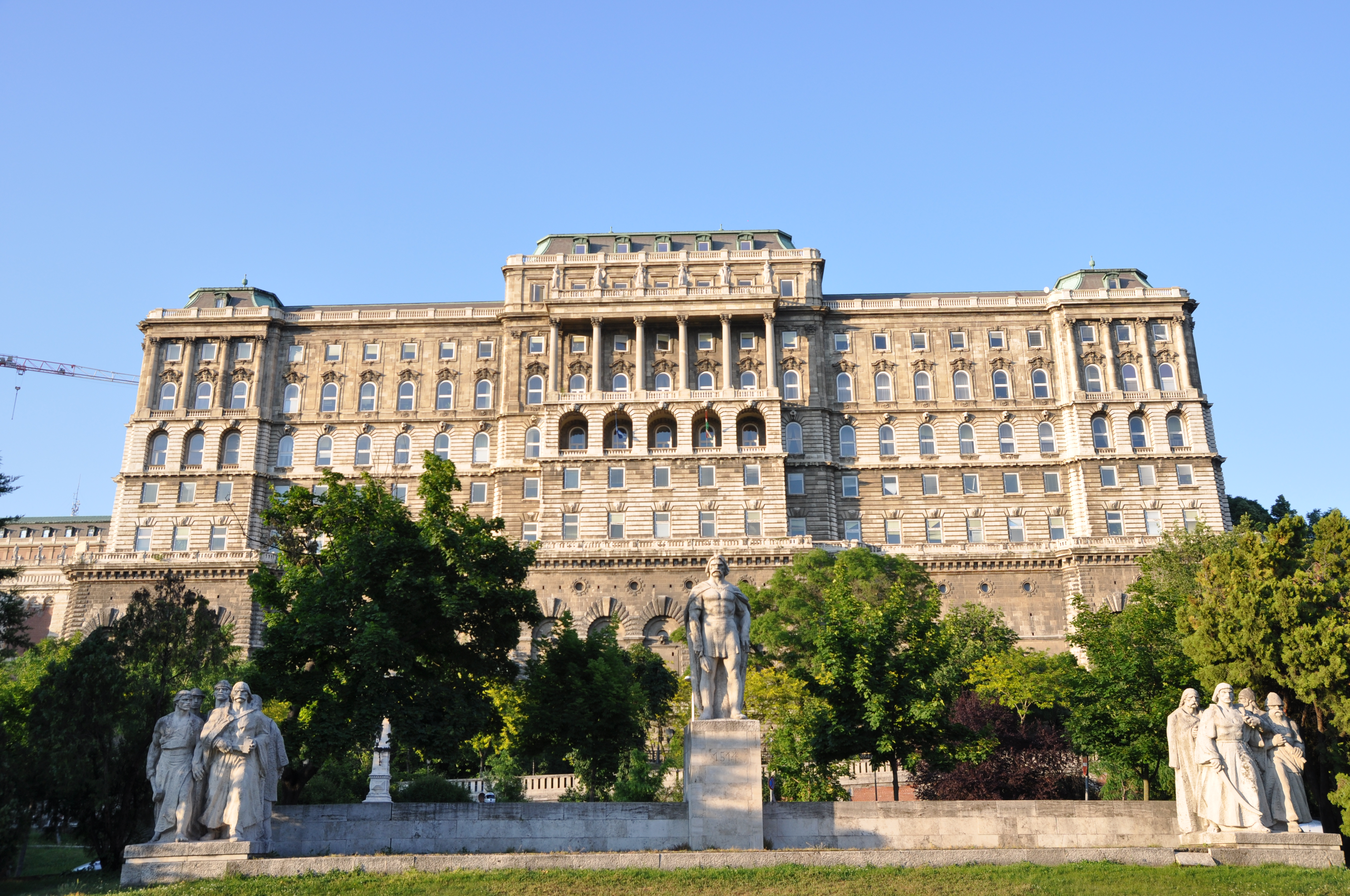 Budapest, Budavári Palota